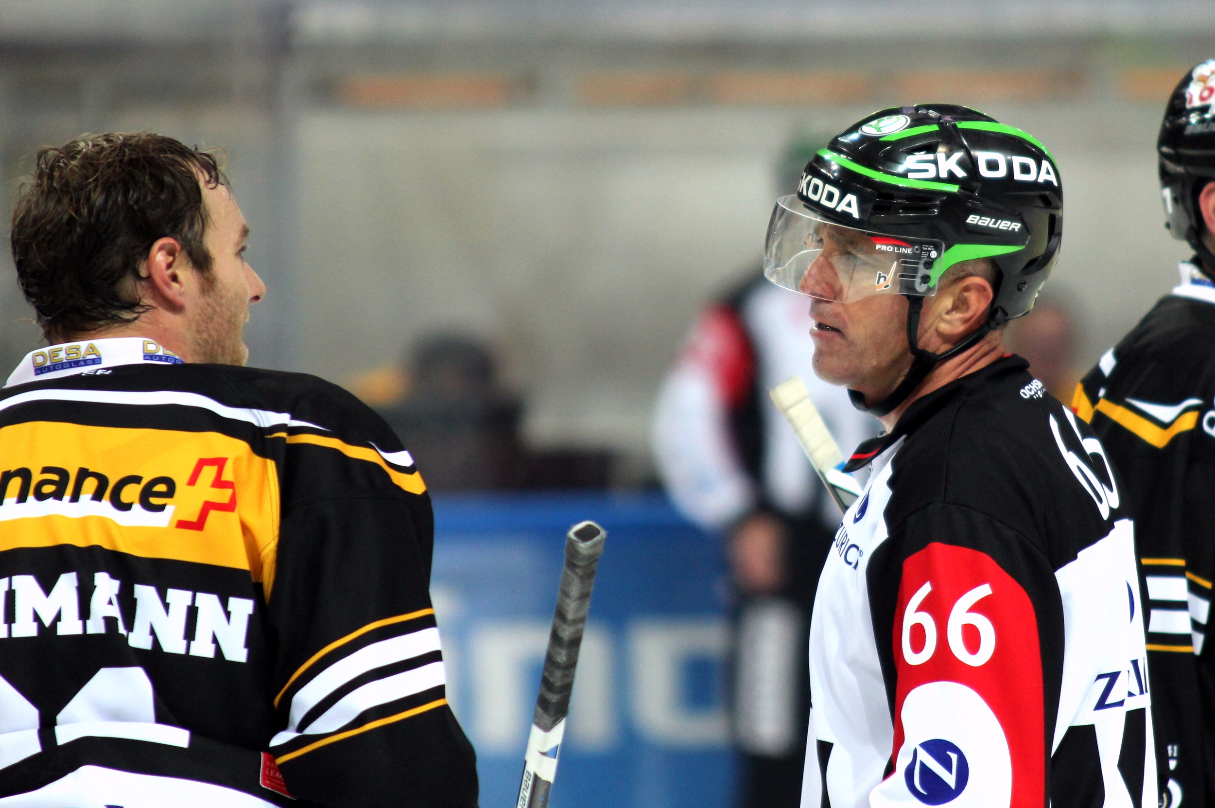 Janick Steinmann (L 21), Danny Kurmann (R 66).